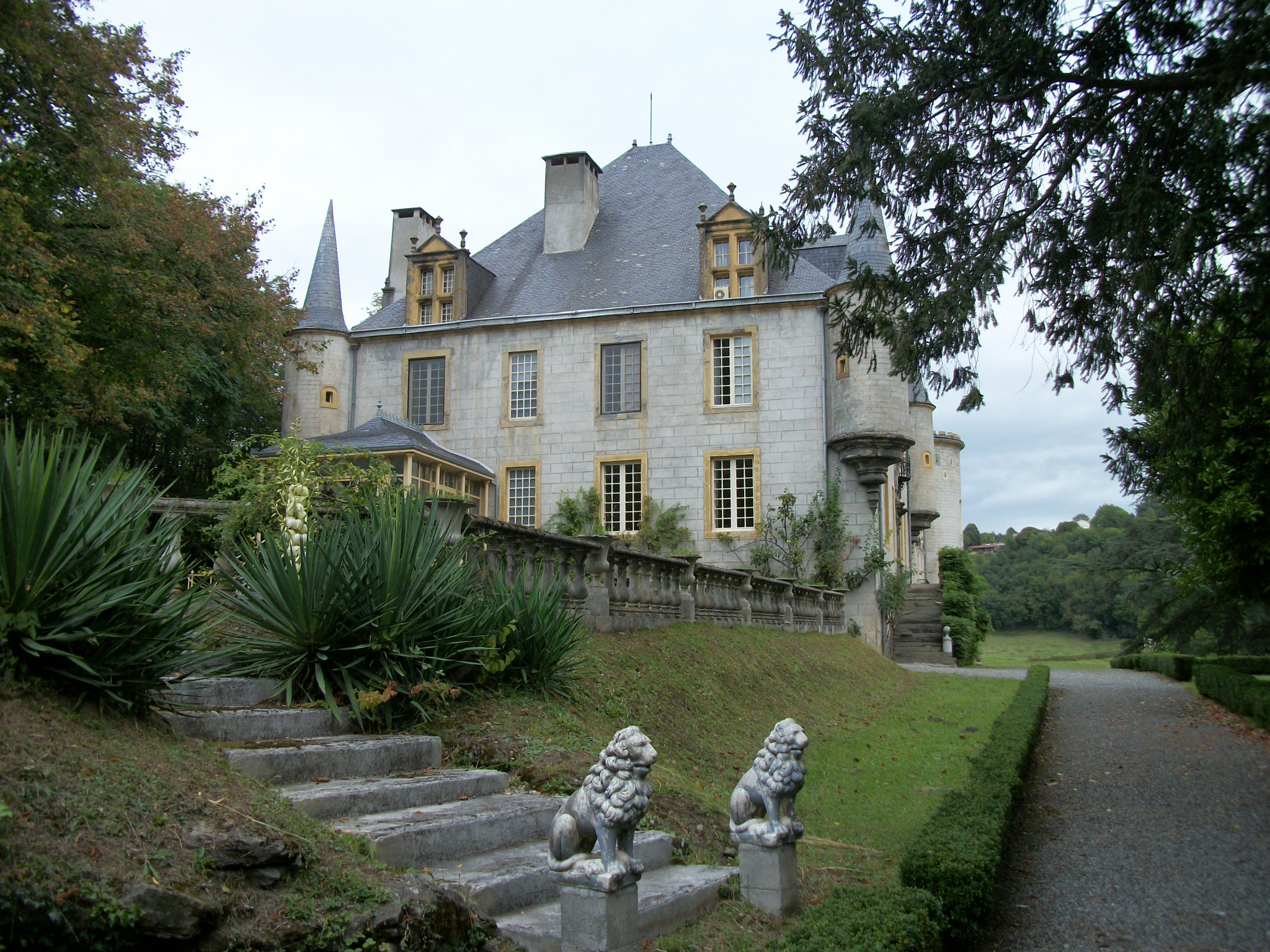 Le Château